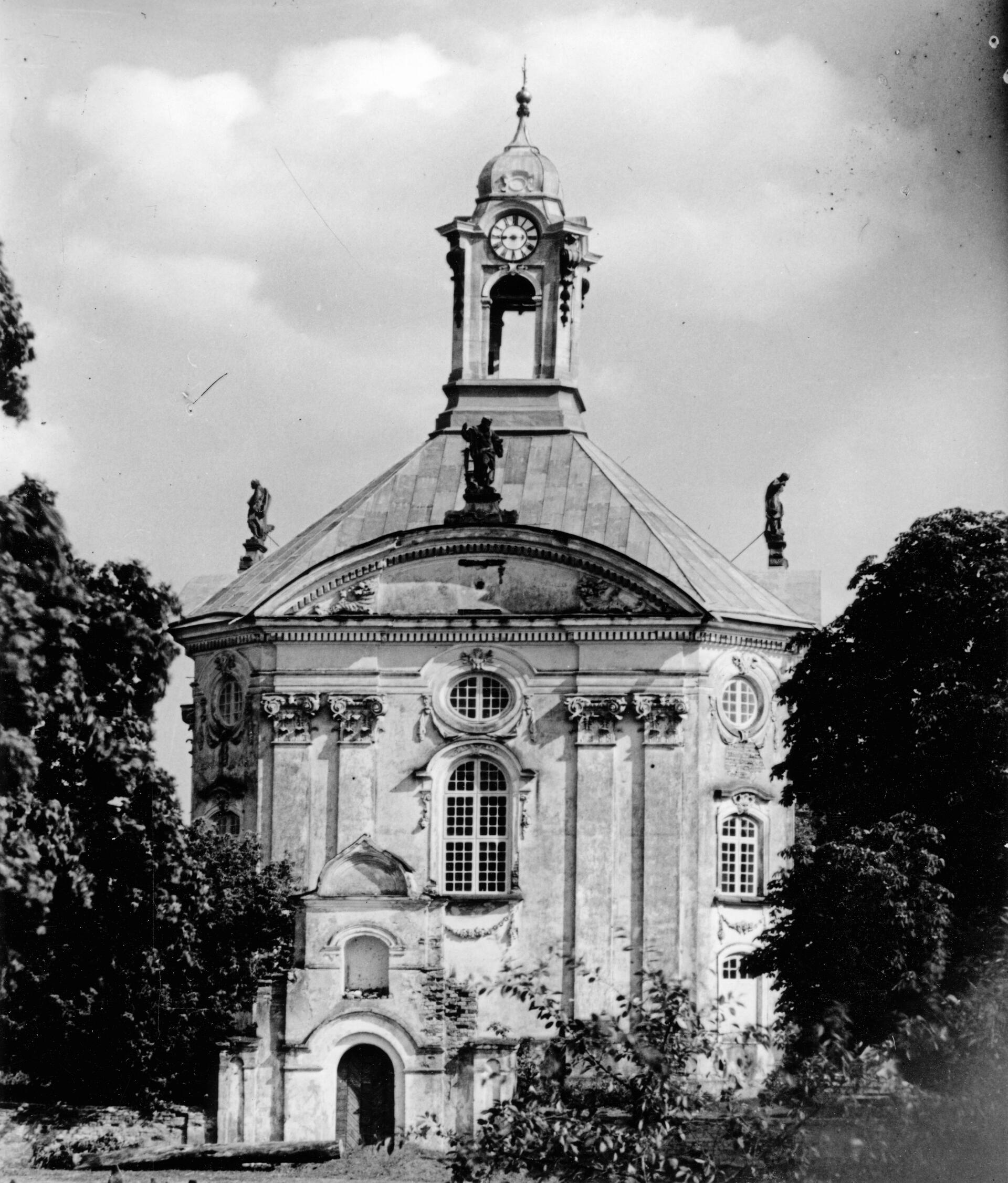 Беларуская (тарашкевіца): Воўчын (Воўчын). Касьцёл Найсьвяцейшай Тройцы